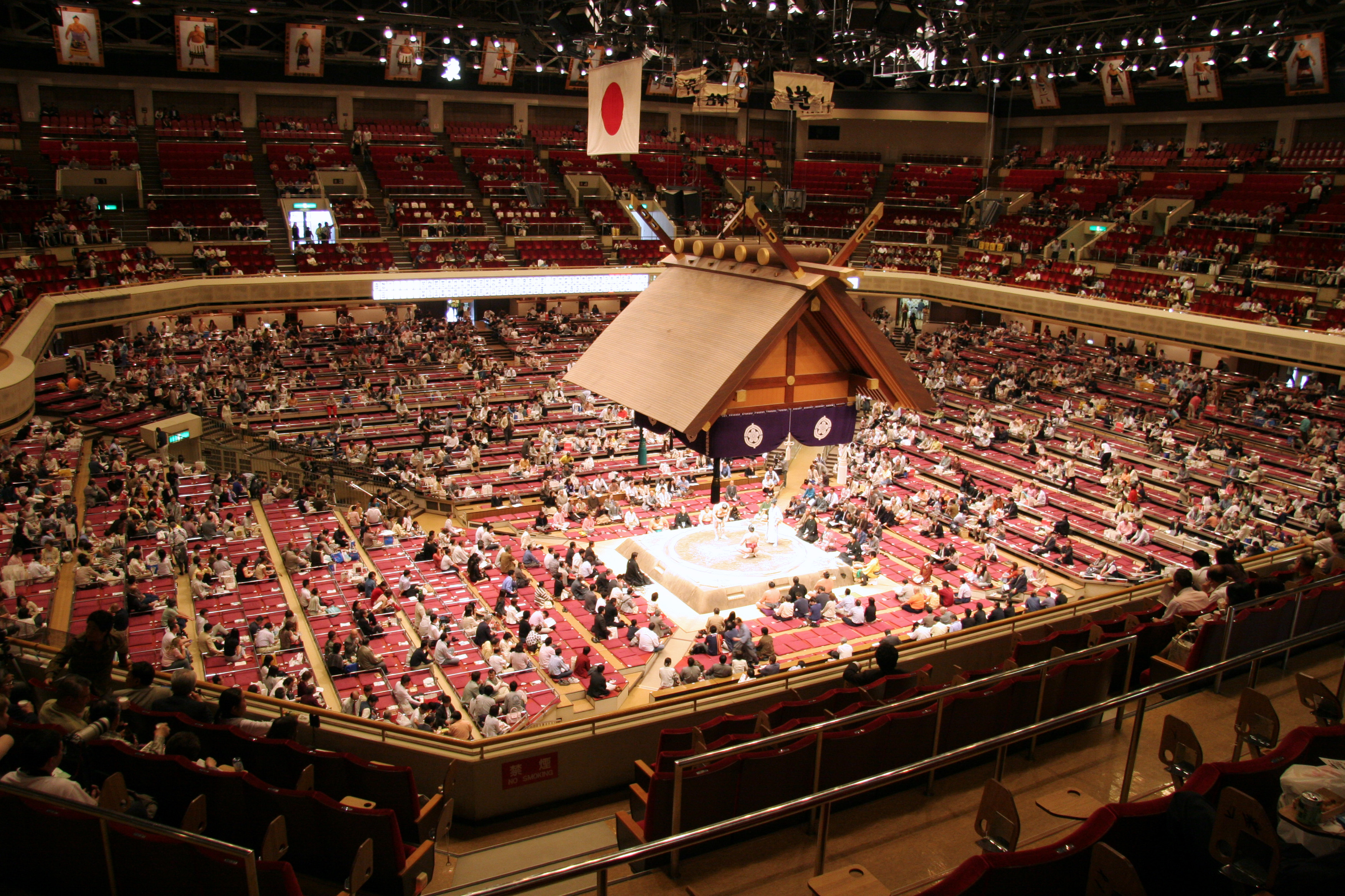 japon, tokyo la salle de combat de sumo